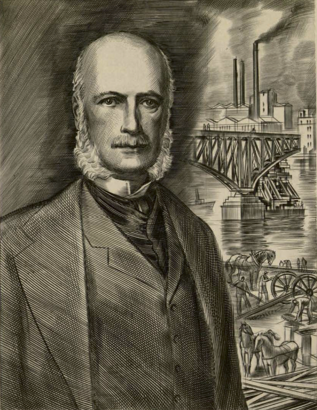 Portrait de Ernest Goüin